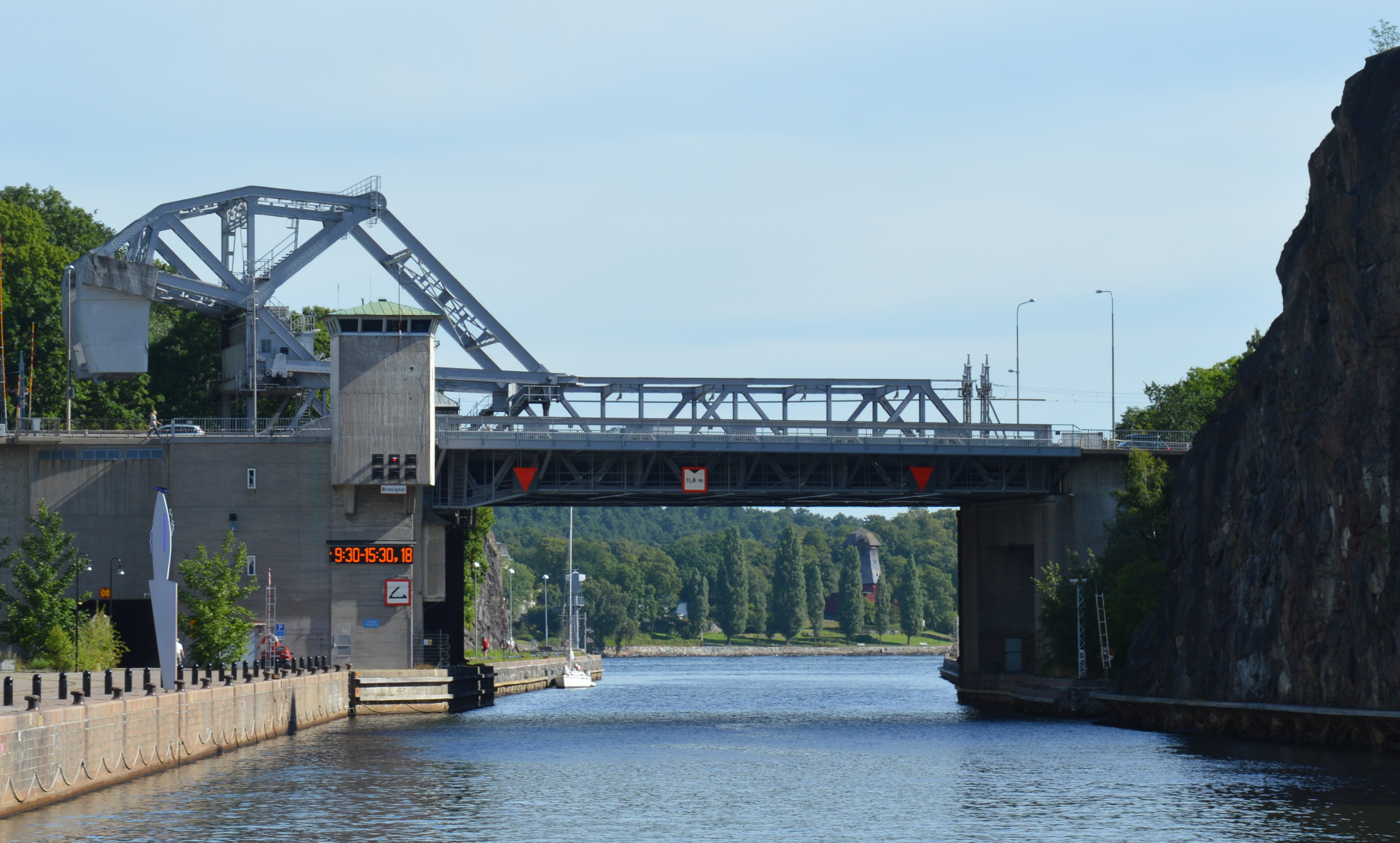 Danviksbro Stockholm